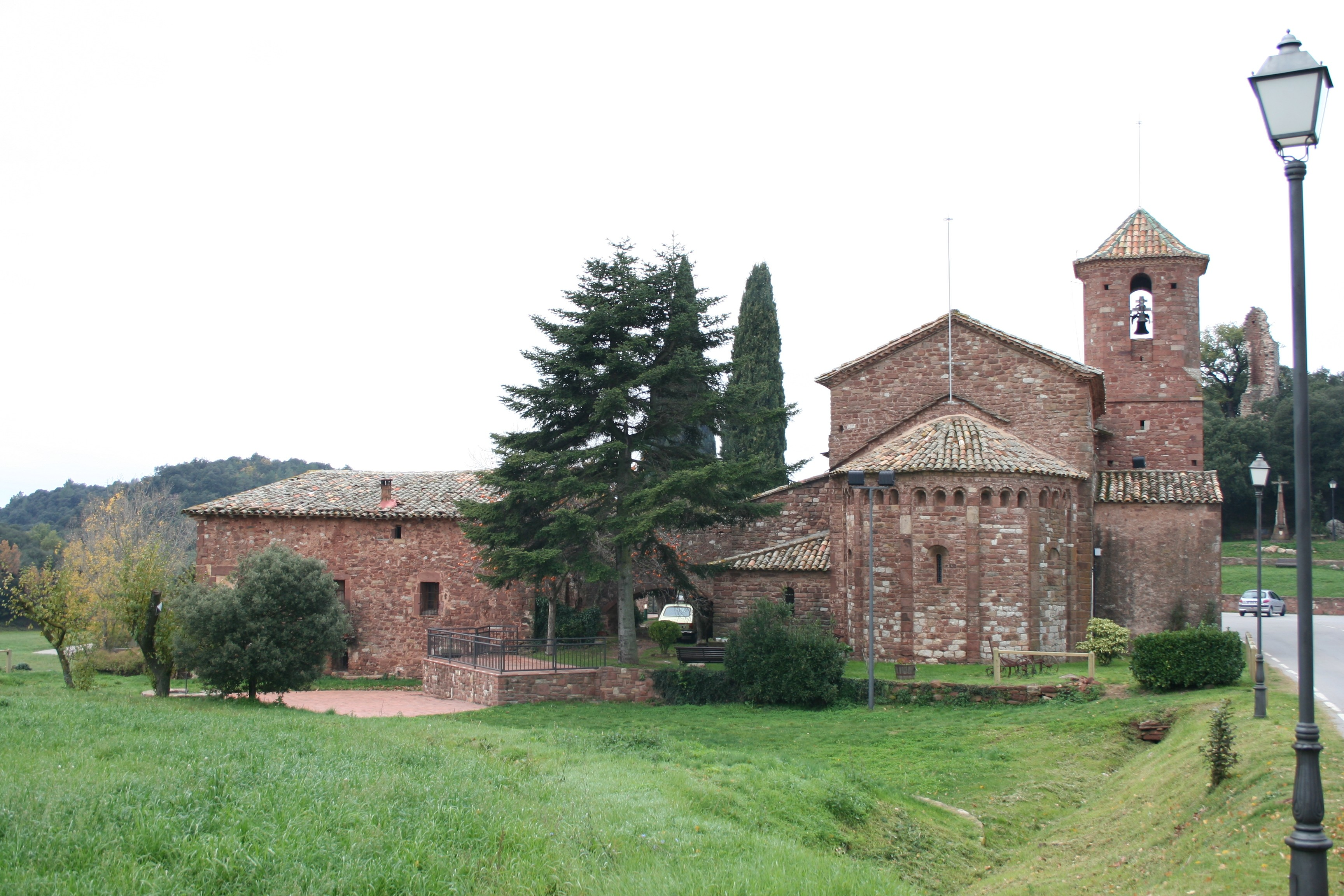 Parte posterior de la iglasia de El Brull